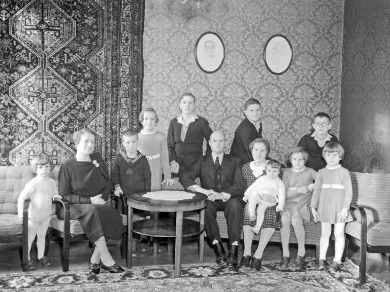 Bundesrat Philipp Etter mit Frau und 10 Kindern